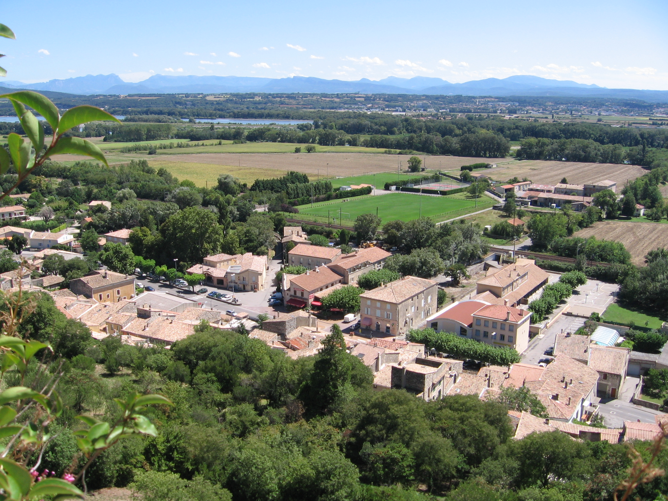 View Rochemaure, France